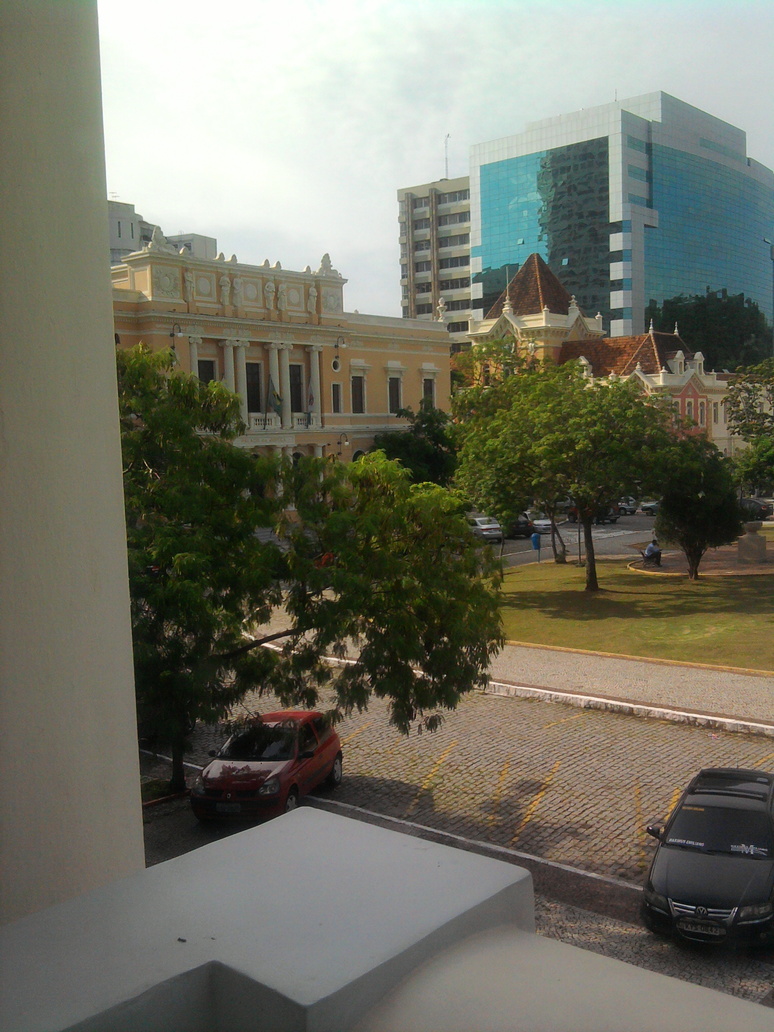 Palácio da Justiça, Chefatura de Polícia (76a DP) e novo Fórum de Niterói, conjunto da Praça da República de Niterói